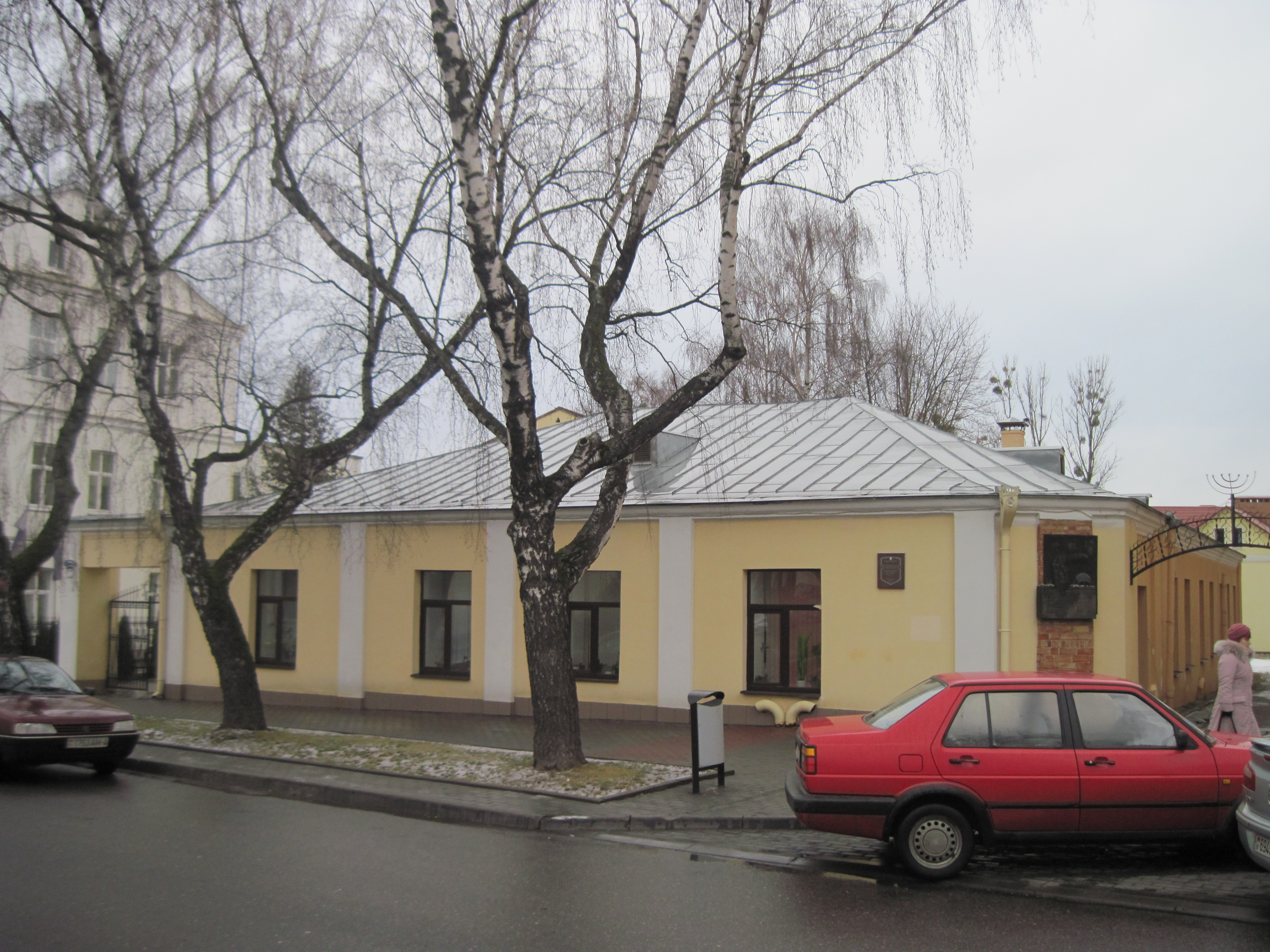 Беларуская (тарашкевіца): Будынак па вуліцы Замкавая, 7 у Гродне